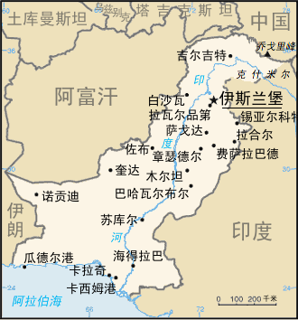 巴基斯坦地图。